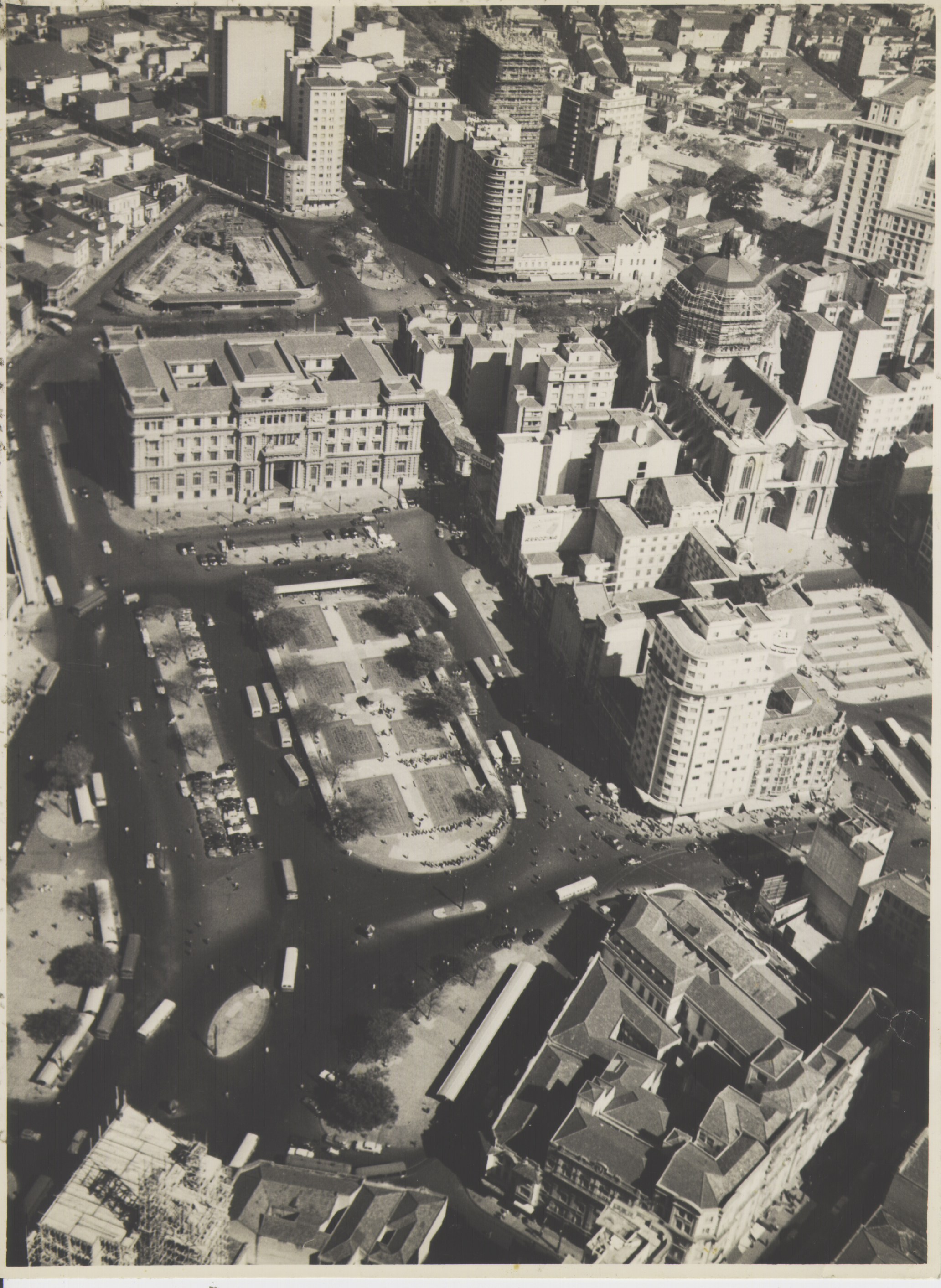 Obra que integra o acervo do Museu Paulista da USP. Coleção Werner Haberkorn